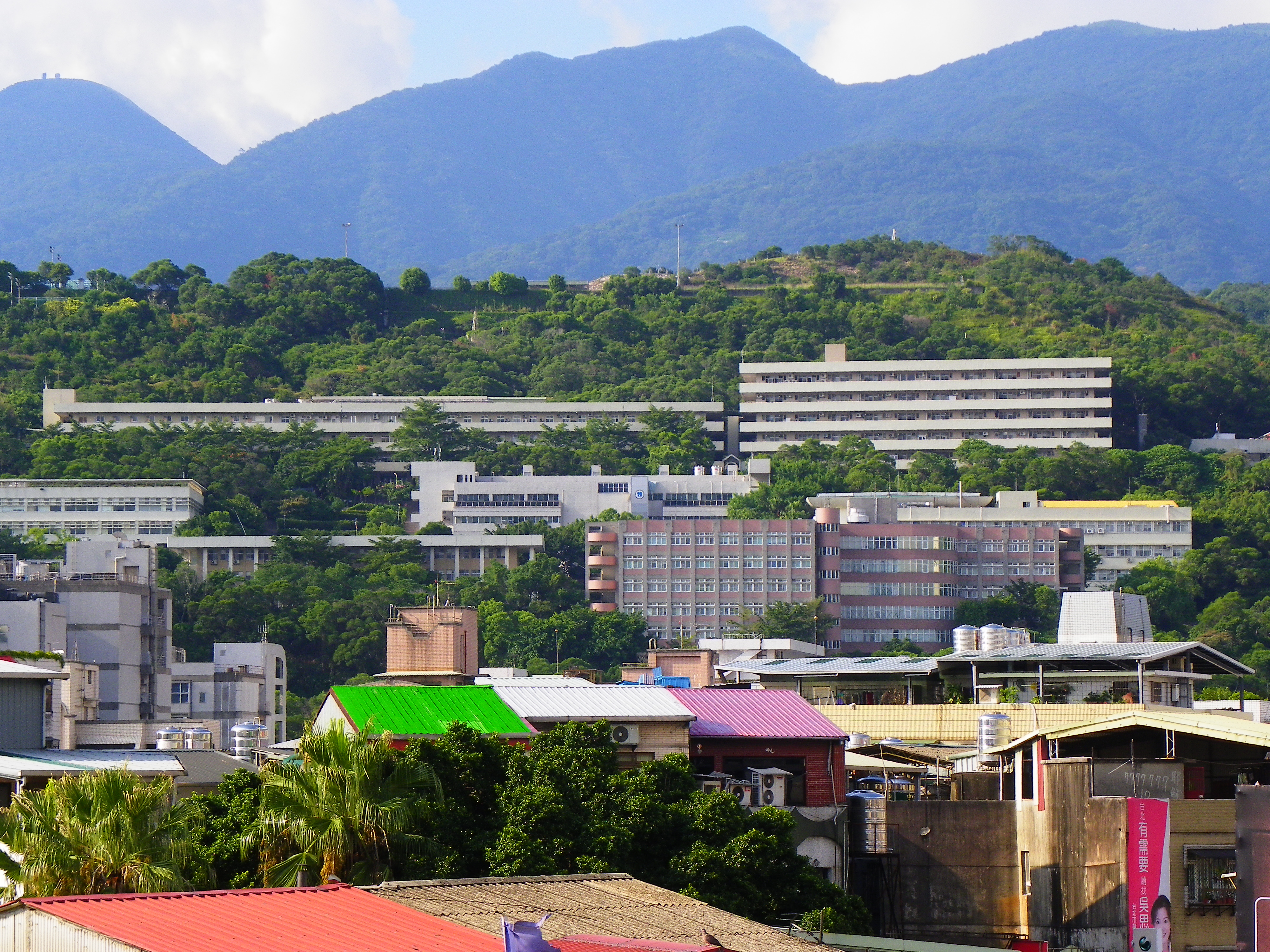 中文（台灣）: 國立陽明大學校舍遠眺，攝於臺北捷運淡水線石牌站外。